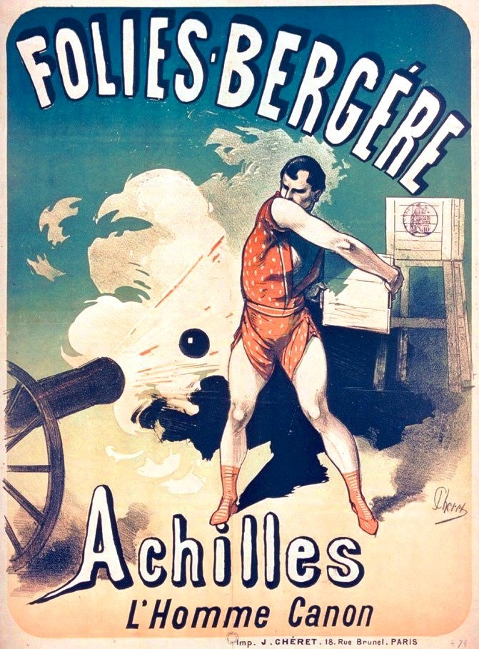 Affiche de Jules Chéret pour un spectacle des Folies-Bergère.